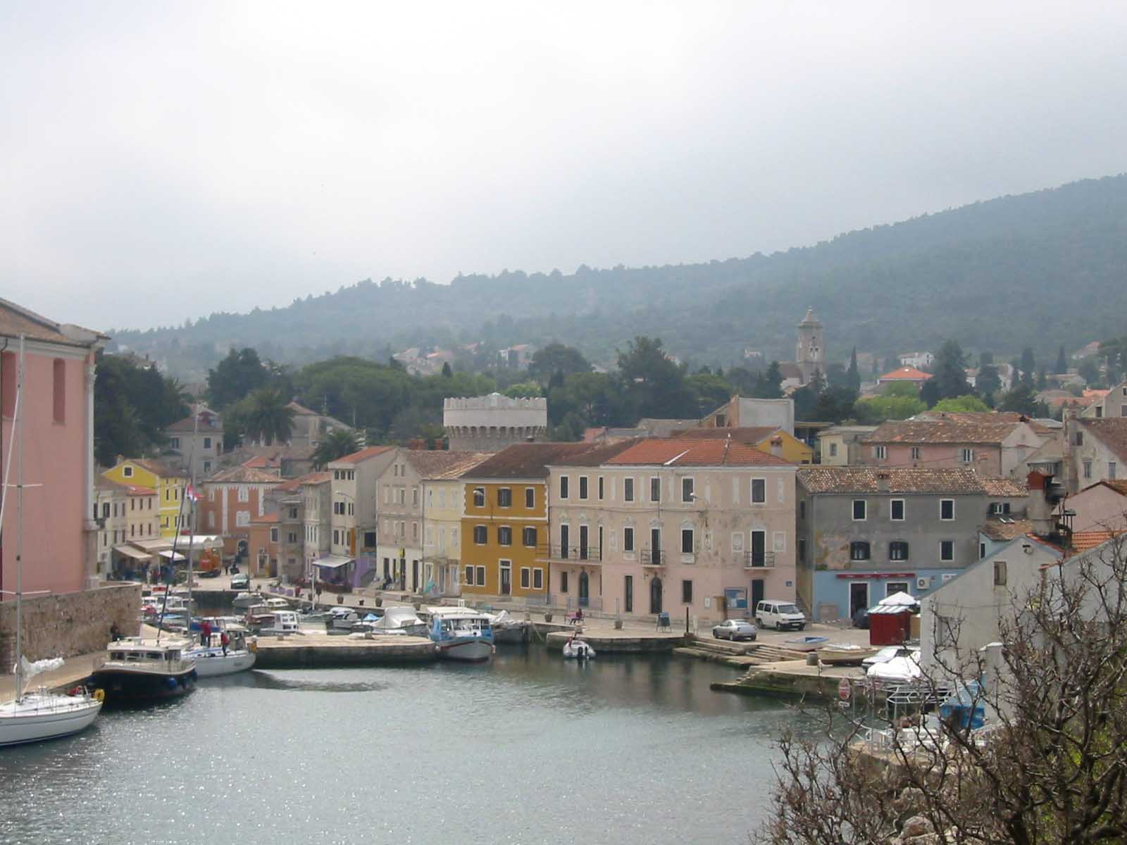 Veli Lošinj photo:Ziga 12:57, 11 April 2007 (UTC)